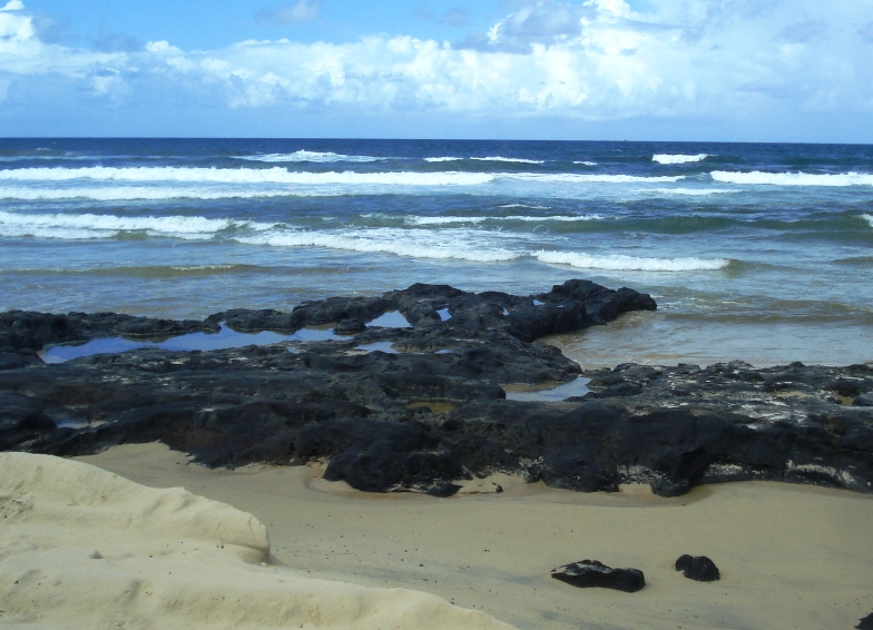 "Coffee Rock" auf Frazer Island - AUS